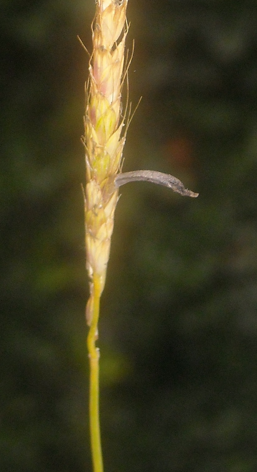 Sclérote de Claviceps purpurea sur Alopecurus myosuroides